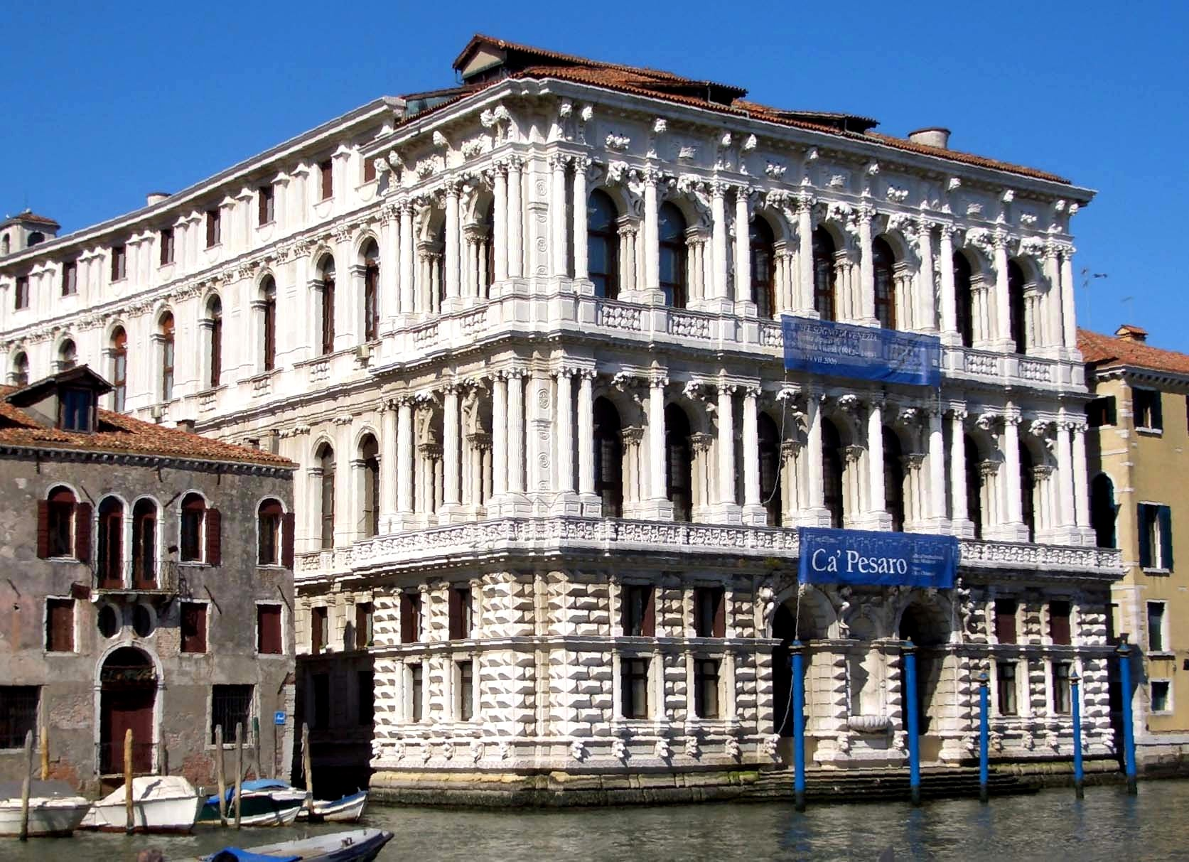 La Ca' Pesaro. Foto scattata da me a Venezia il 10.9.05.